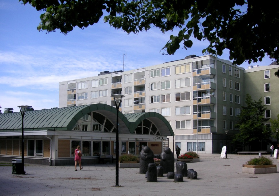 Bergshamra centrum med biblioteket